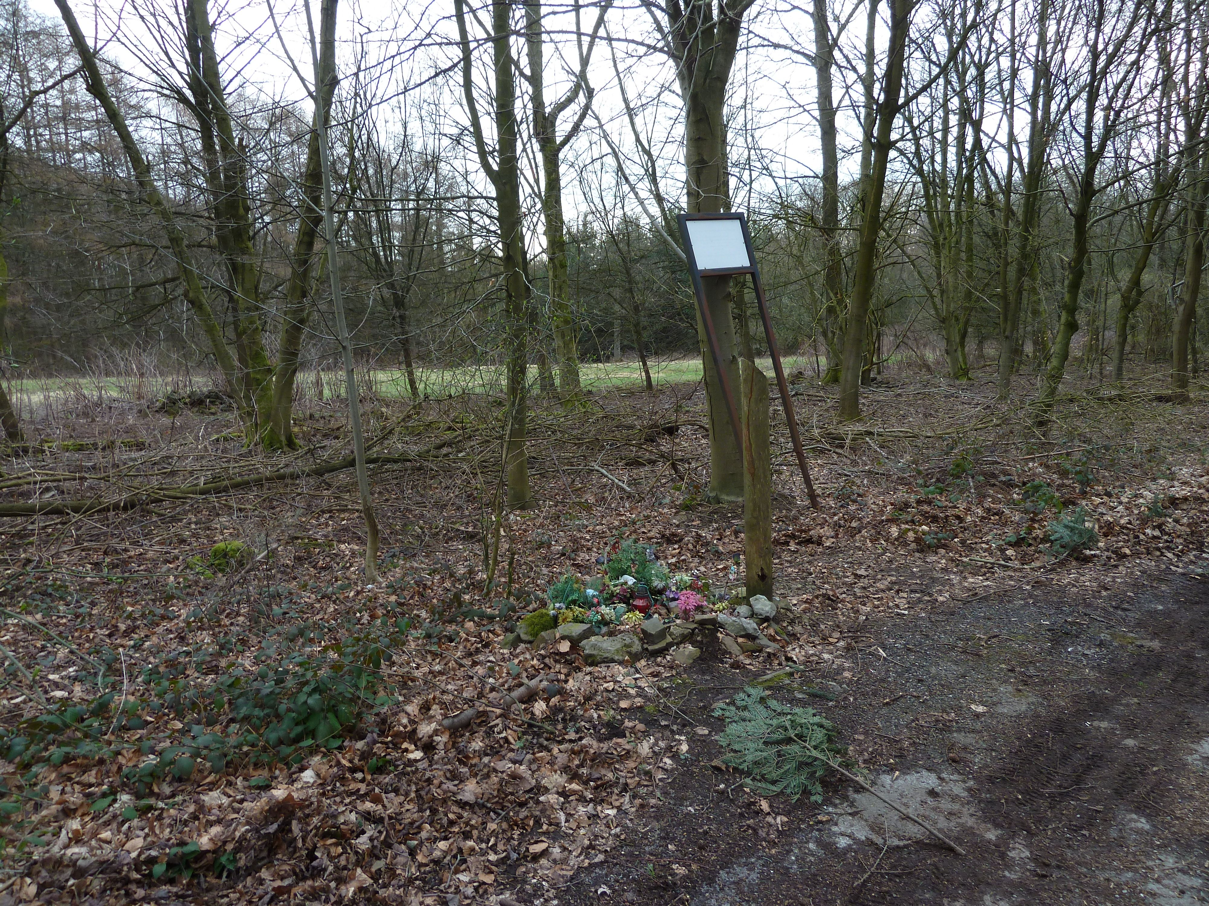 Blumengelege und Gedenktafel an das Endphaseverbrechen am Gelände des ehemaligen Schießstands auf dem Burggrafenberg im Staatsforst Burgholz in Wuppertal